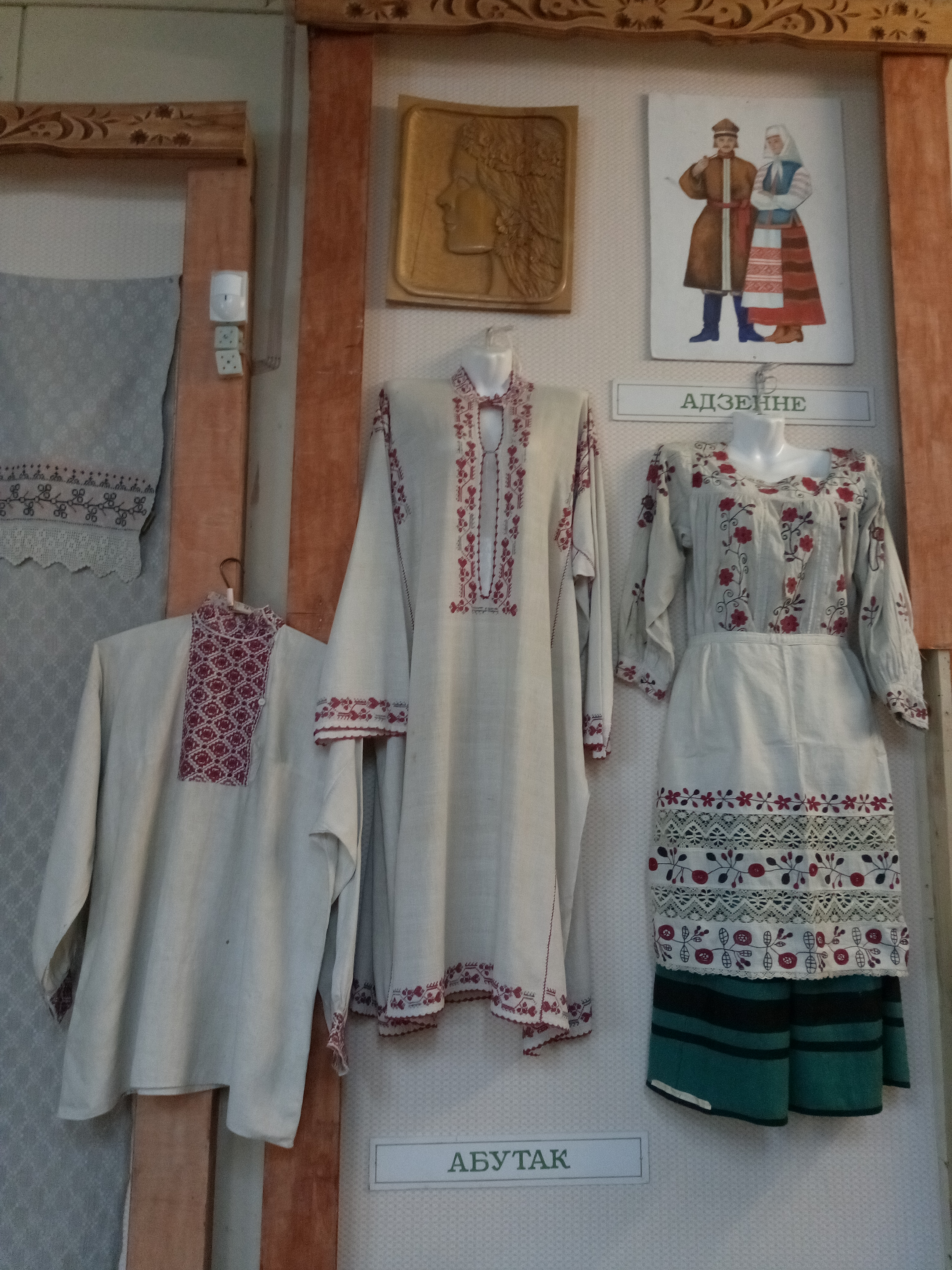 Пухавіцкі строй.